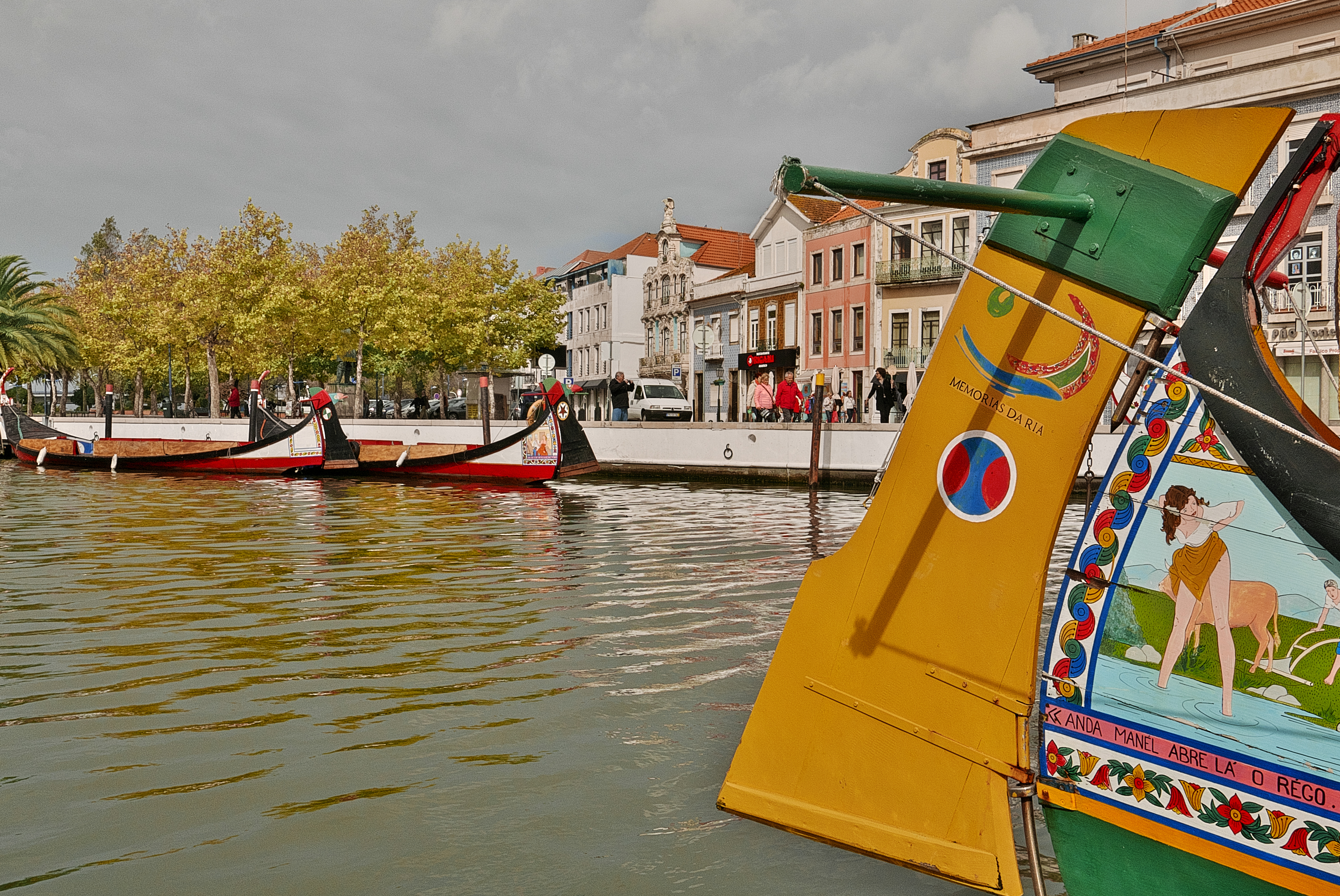 Una embarcación típica de Aveiro.